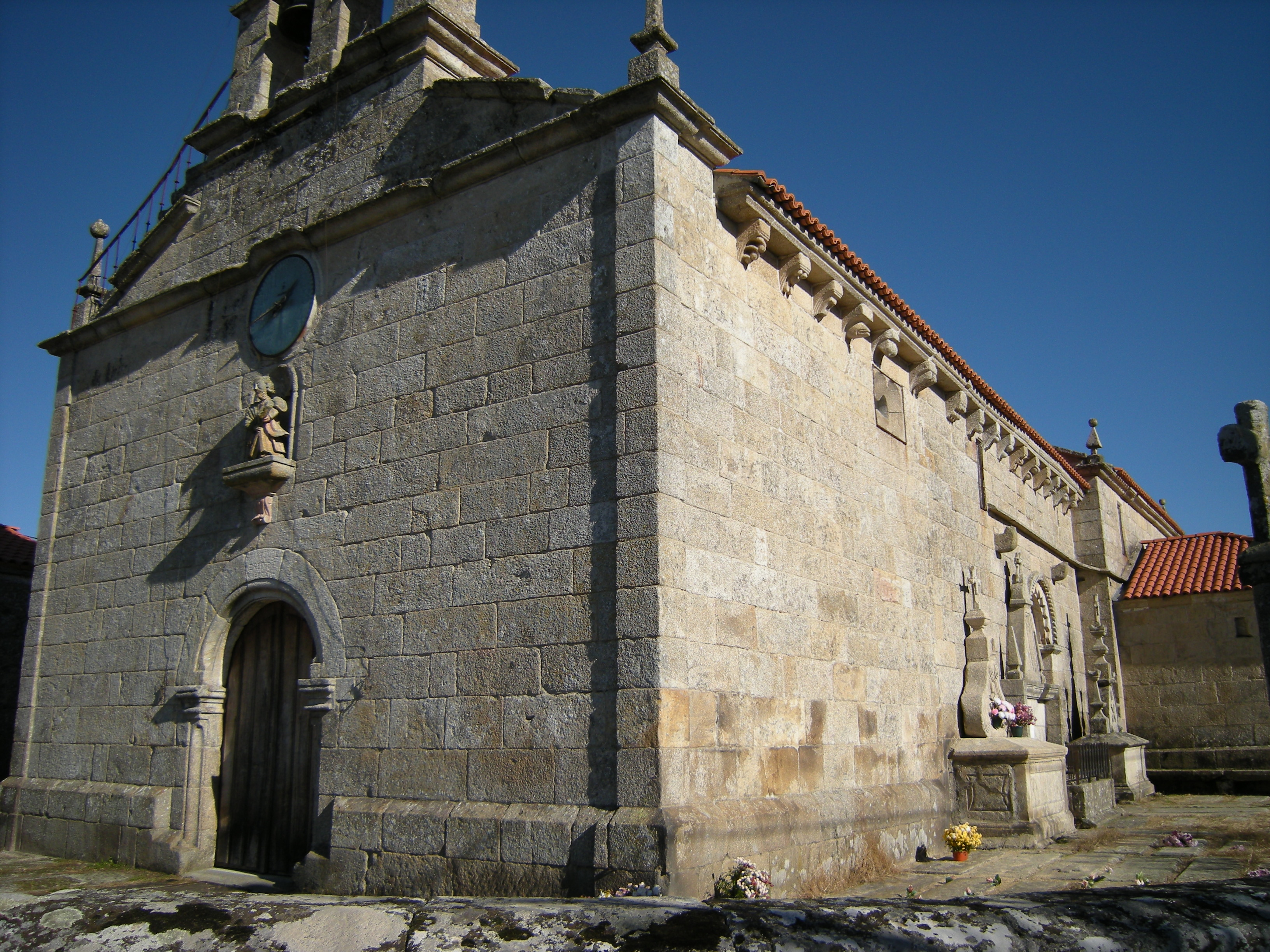 Igrexa de Santo André de Guillamil, Rairiz de Veiga